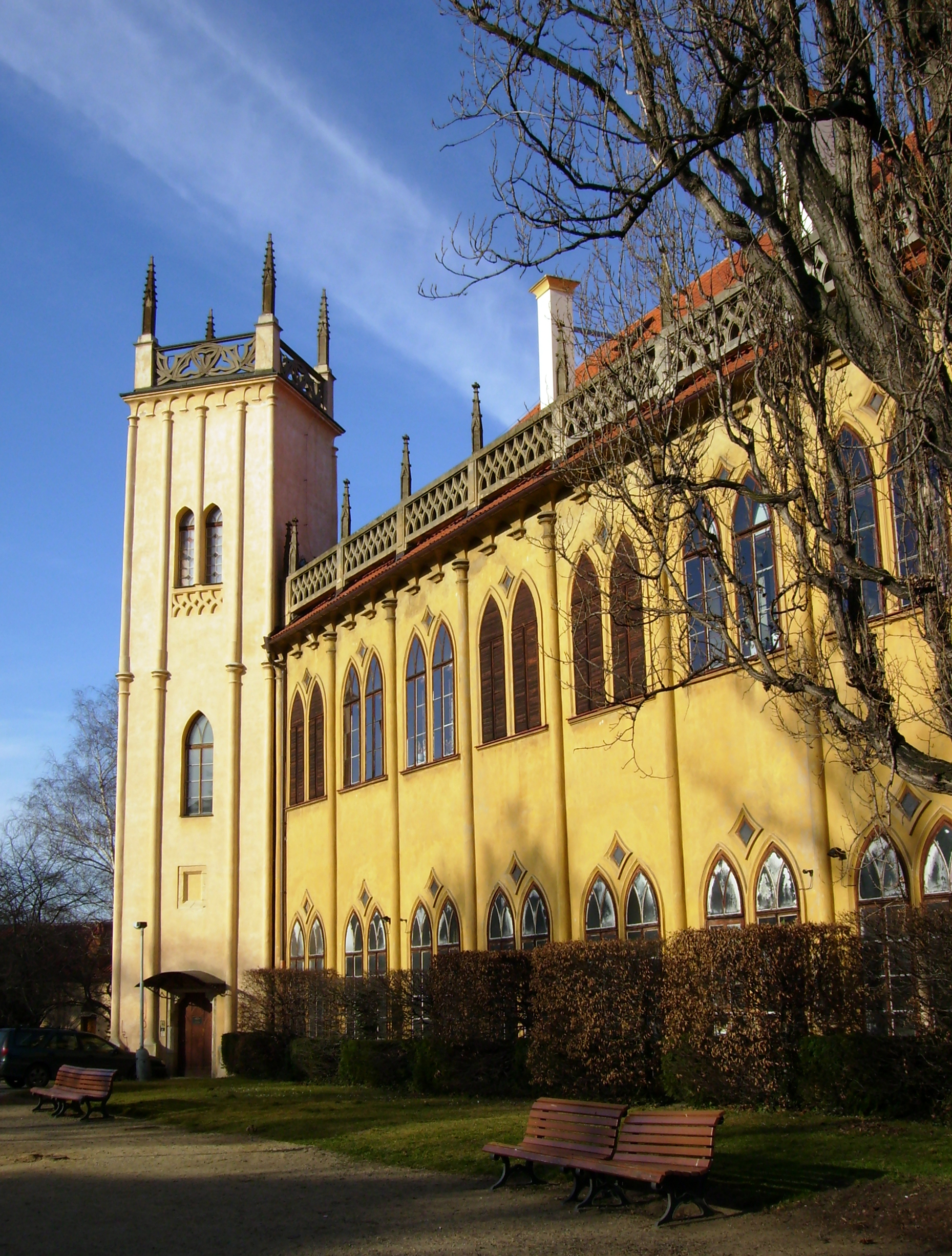 Místodržitelský letohrádek. Studovna časopisů Knihovny Národního muzea v pražské Stromovce.